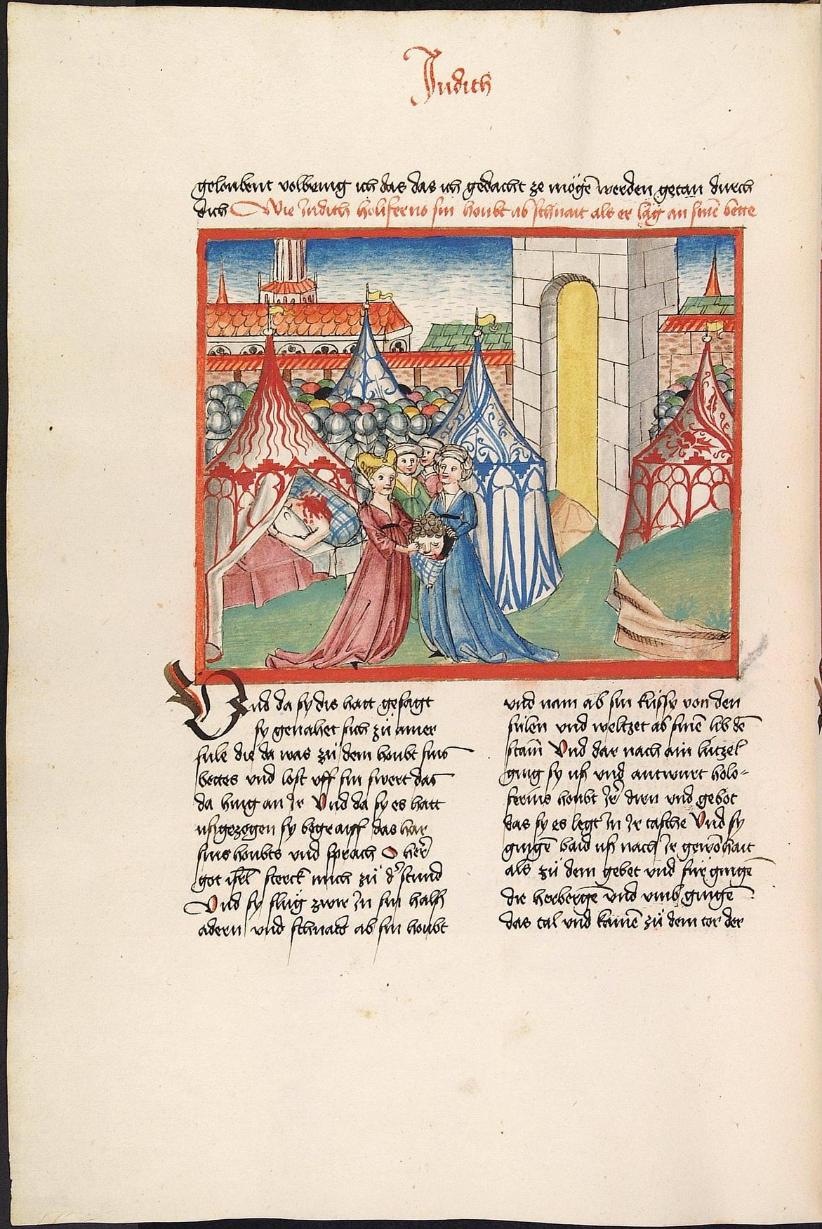 Codex Palatinus germanicus 17, Blatt 255v - Bibel, Altes Testament, Buch Judit: Judith und ihre drei Dienerinnen stecken das Haupt des Holofernes in den Bezug eines Kopfkissens. Links das offene Zelt des Holofernes, in einem Bett liegt sein kopfloser Rumpf. (Cpg 17 = Bibel AT, deutsch, Bücher Könige, Chroniken, Esra, Tobias, Judit, Ester, Hiob)